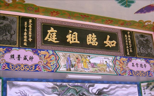 台灣學甲鎮白礁亭題字「如臨祖庭」